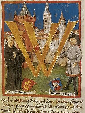 Sigismund Meisterlin: Augsburger Chronik 1457, Staats- und Stadtbibliothek Augsburg 2° Cod. Aug. 60 Bl. 1r